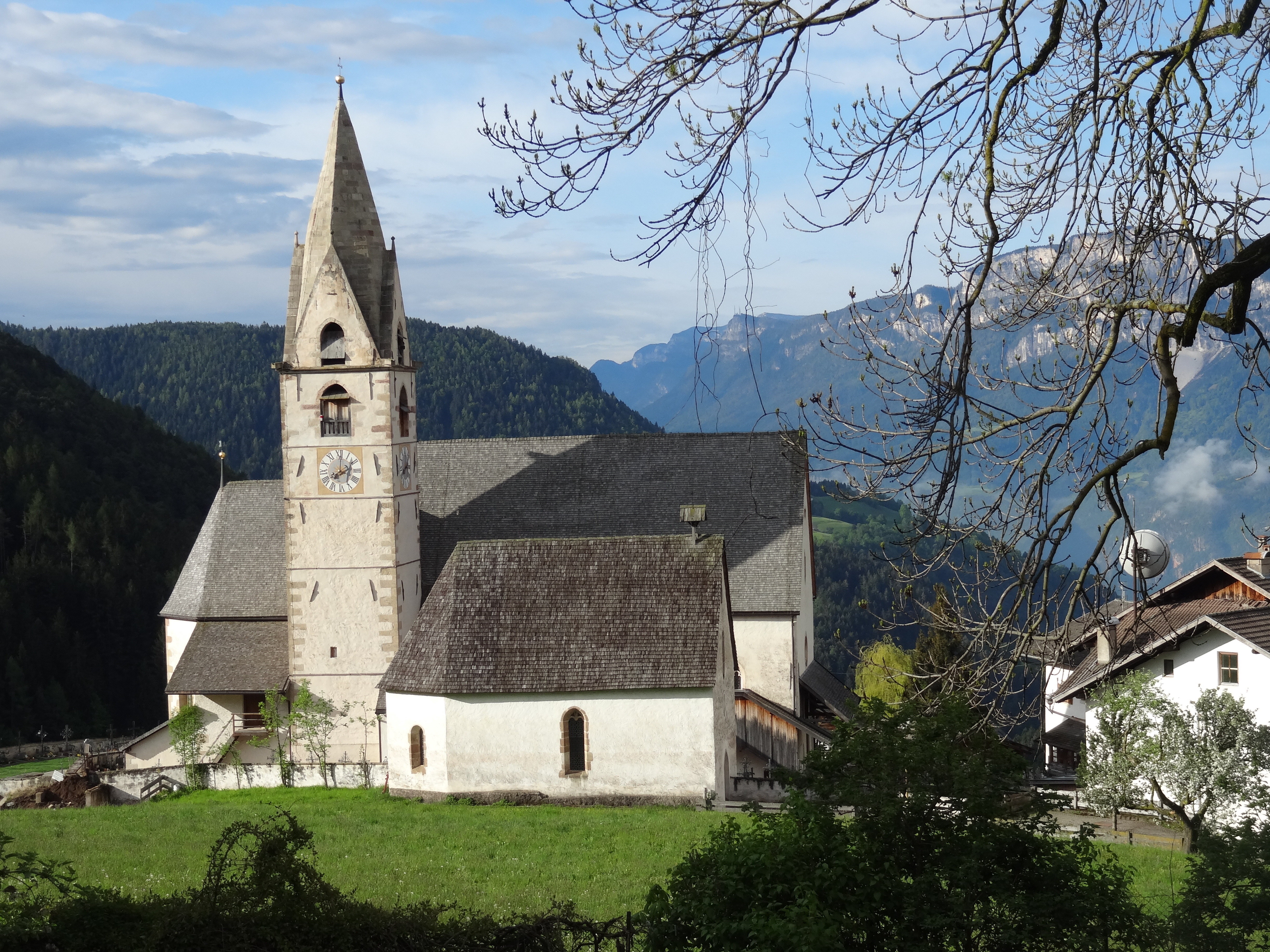 Außenansicht der Pfarrkirche Mariä Himmelfahrt in Mölten, Südtirol; im Vordergrund die Kapelle St. Anna am Friedhof